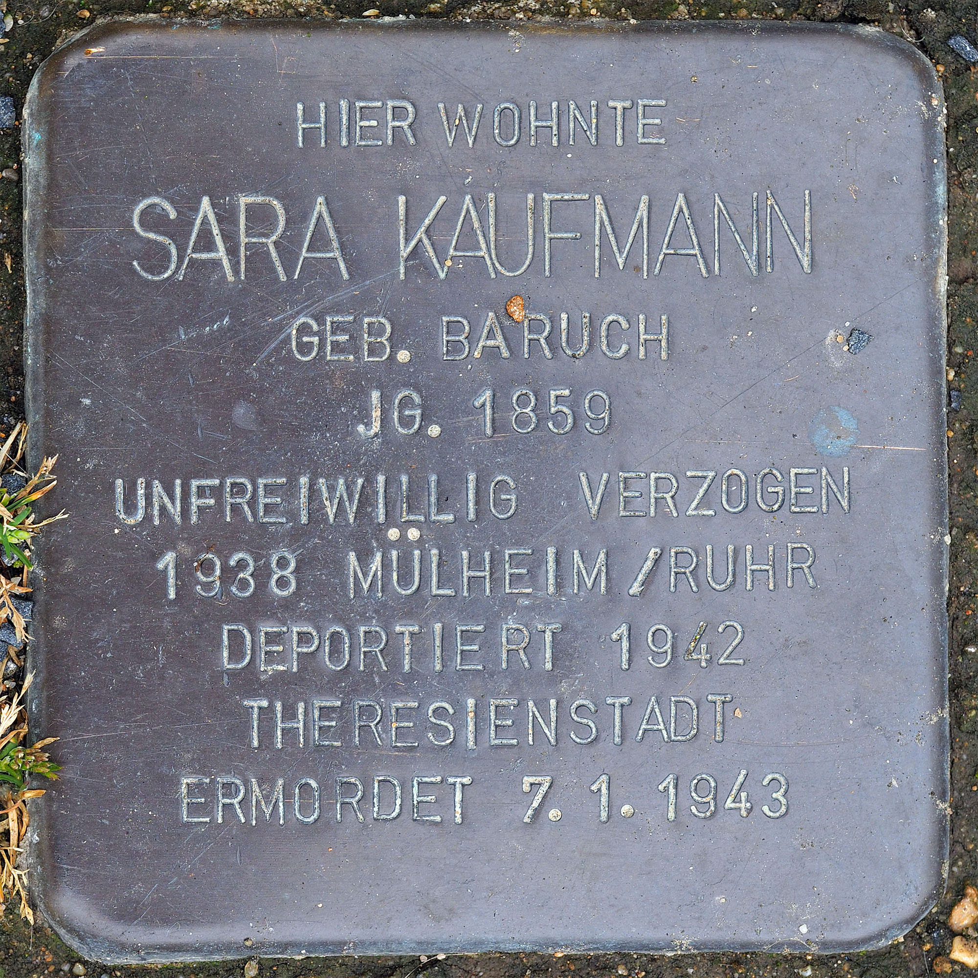 Stolpersteine GV: Kaufmann Sara